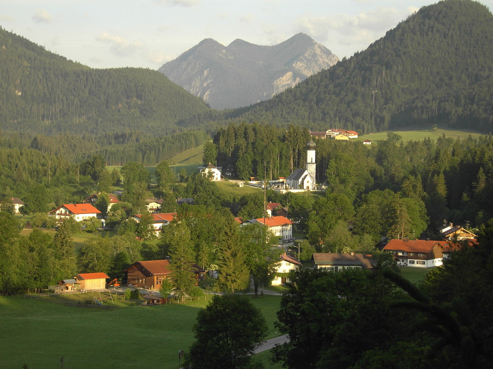 Ortsteil Dorf der Jachenau im August 2008 um 06:00 Uhr